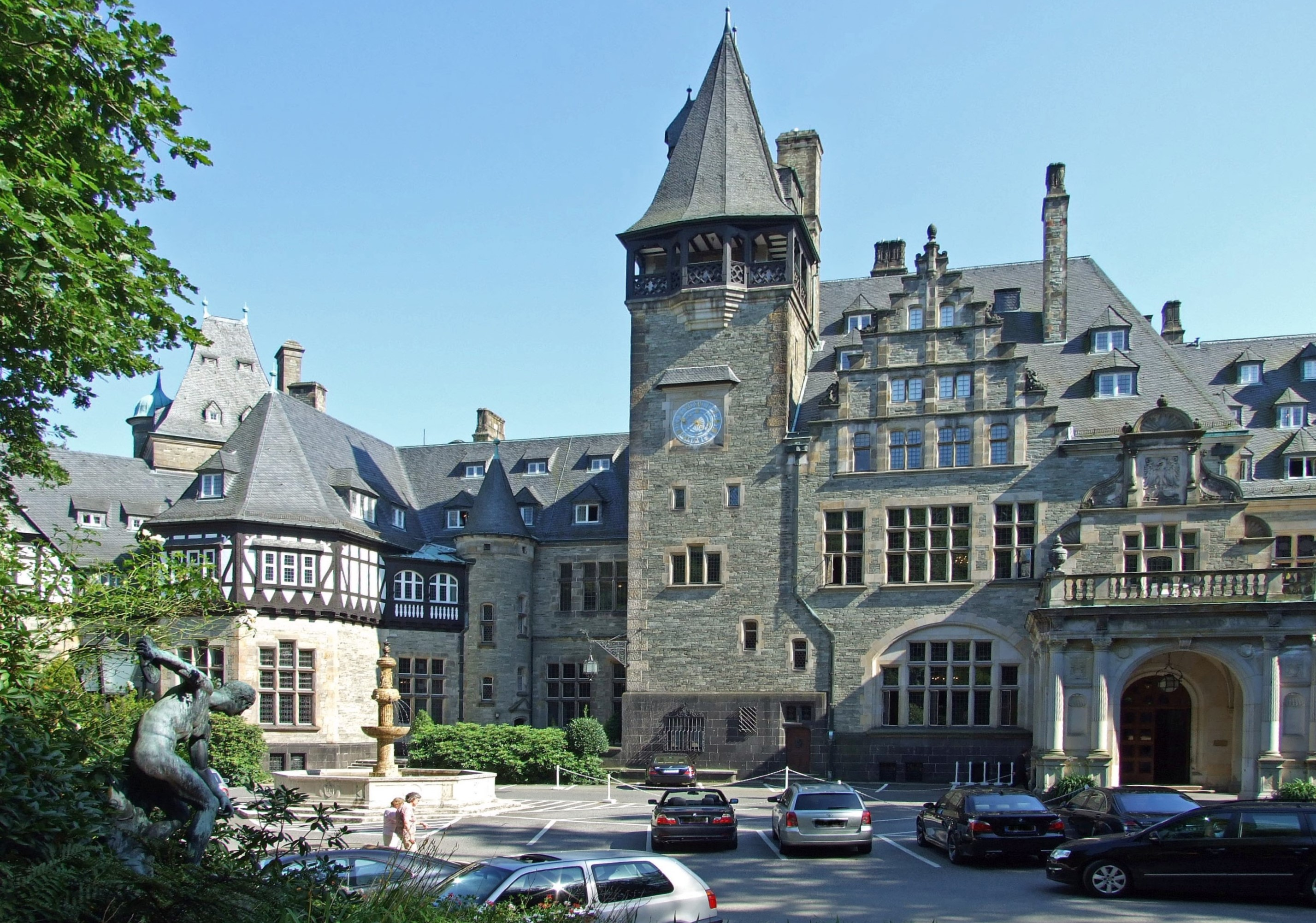 Schloss Friedrichshof im Kronberger Schlosspark.